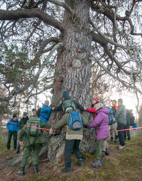 Bjønnafurua "avdukning" etter fullført oppmåling.